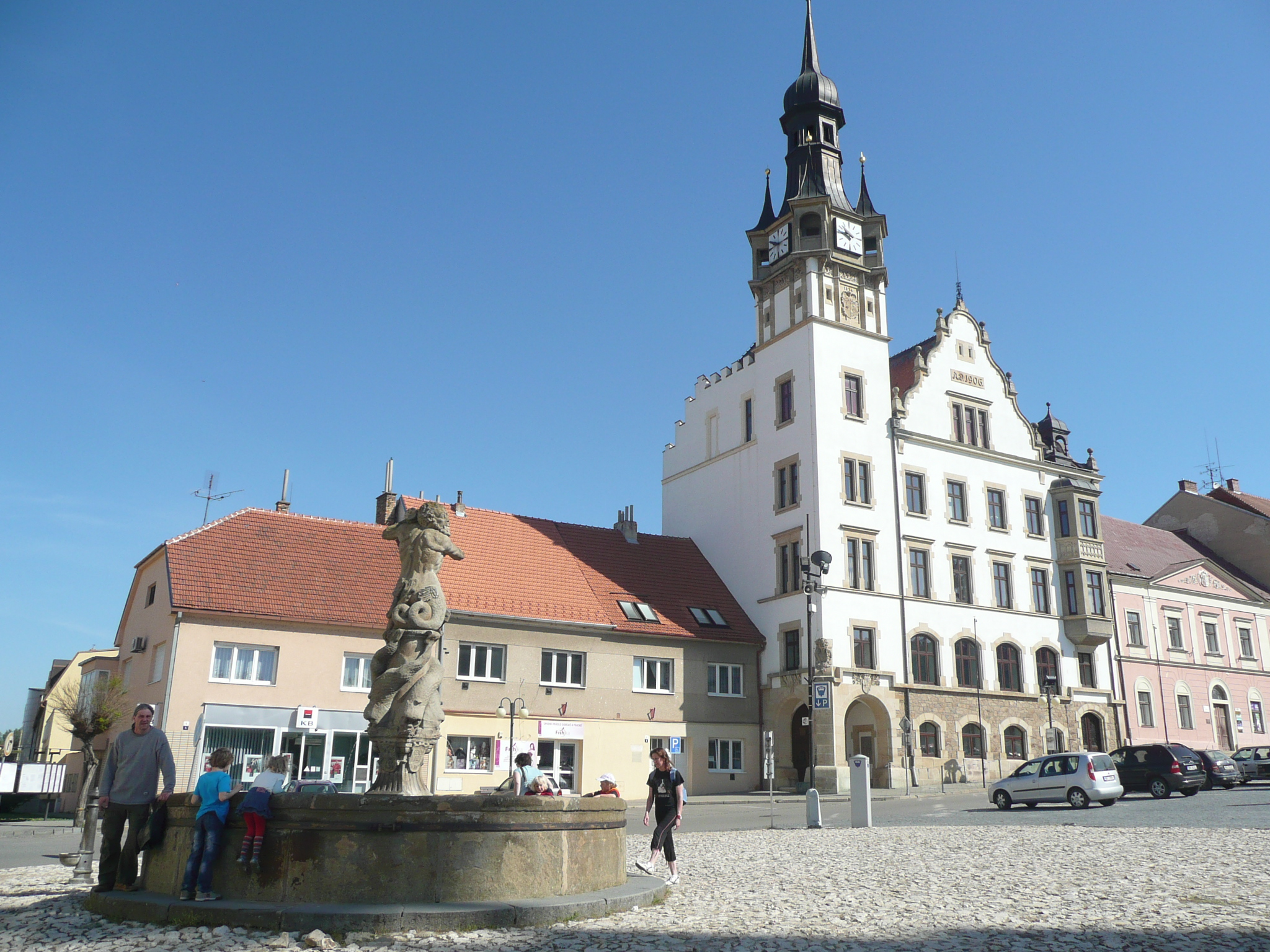 Kašna a radnice v Hustopečích